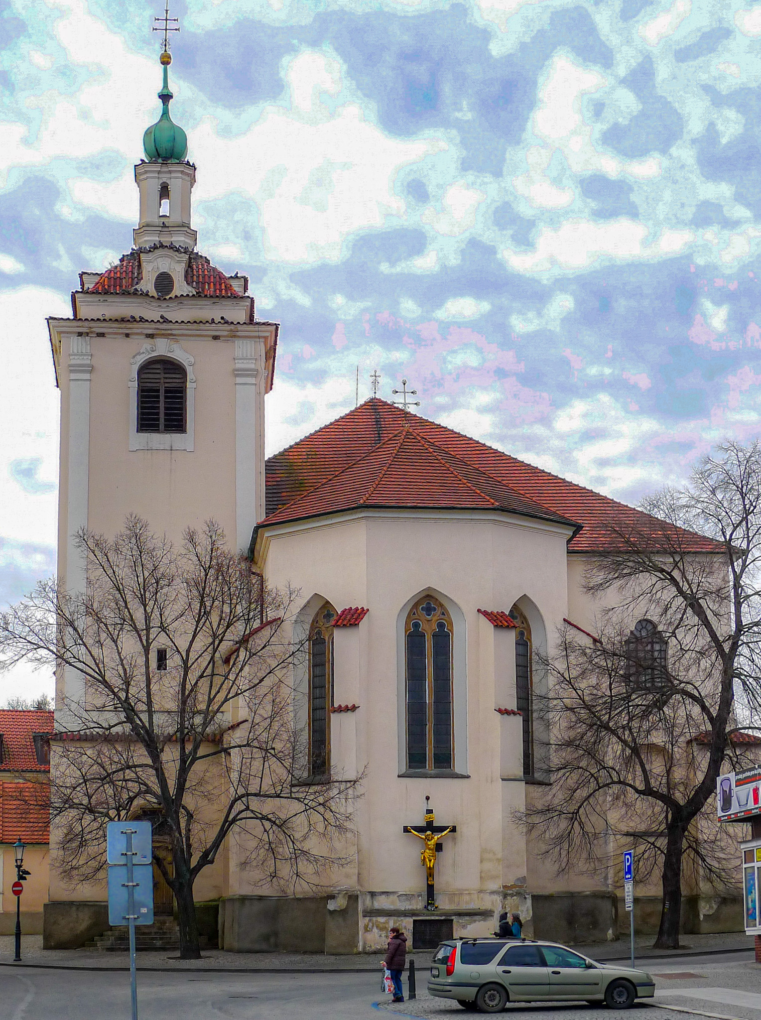 Kostel sv. Jakuba (Beroun), nám. Seydlovo, Beroun